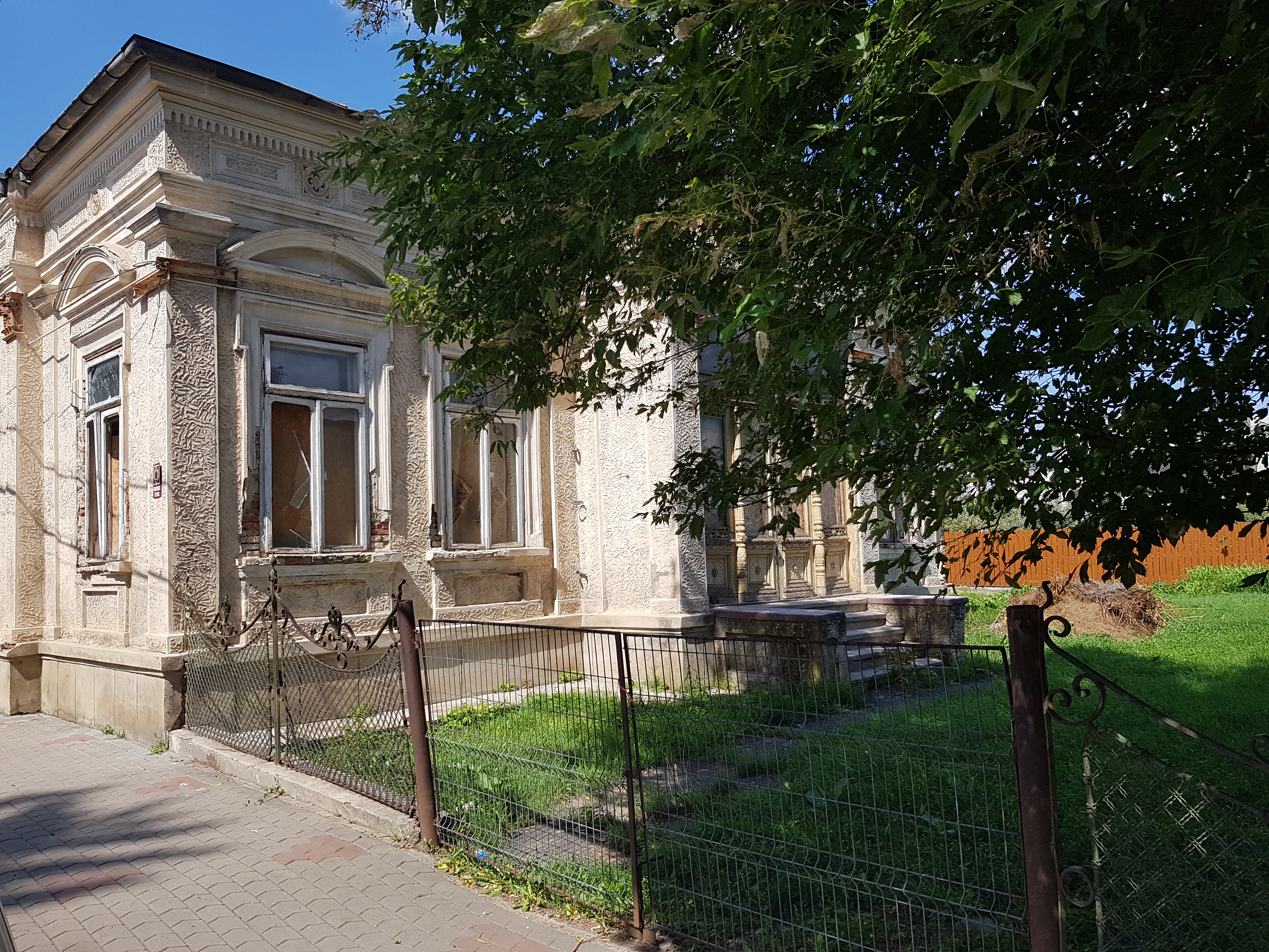 Monument istoric